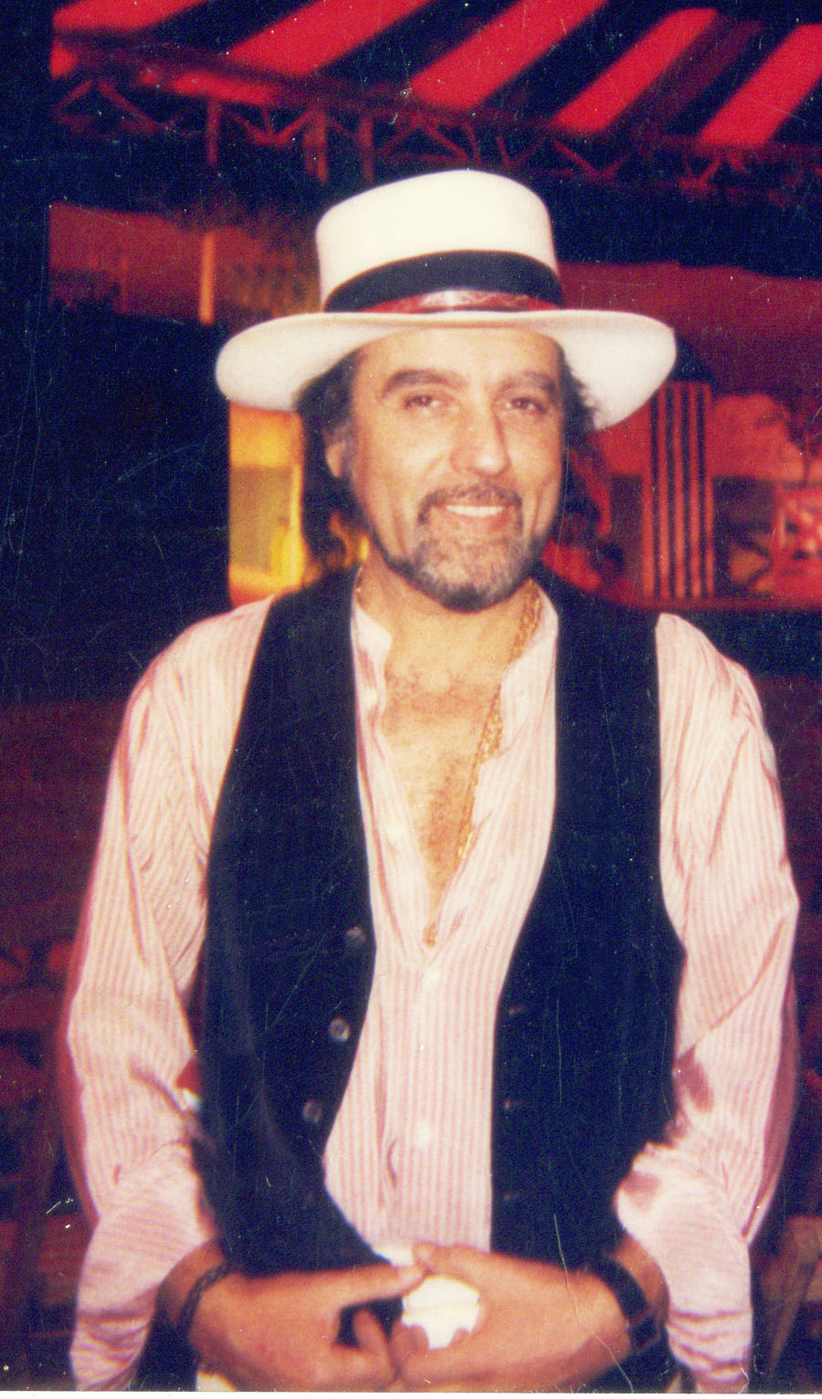 Le chanteur Danyel Gérard, lors d'un spectacle sous chapiteau, à La Baule, le 19 June 1983. (Polaroïd)